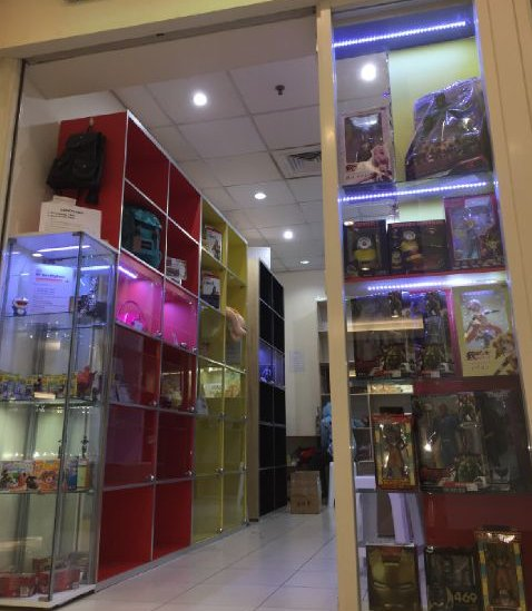 Toko Konsinyasi yang menyewakan rak kepada para pedagang kecil.